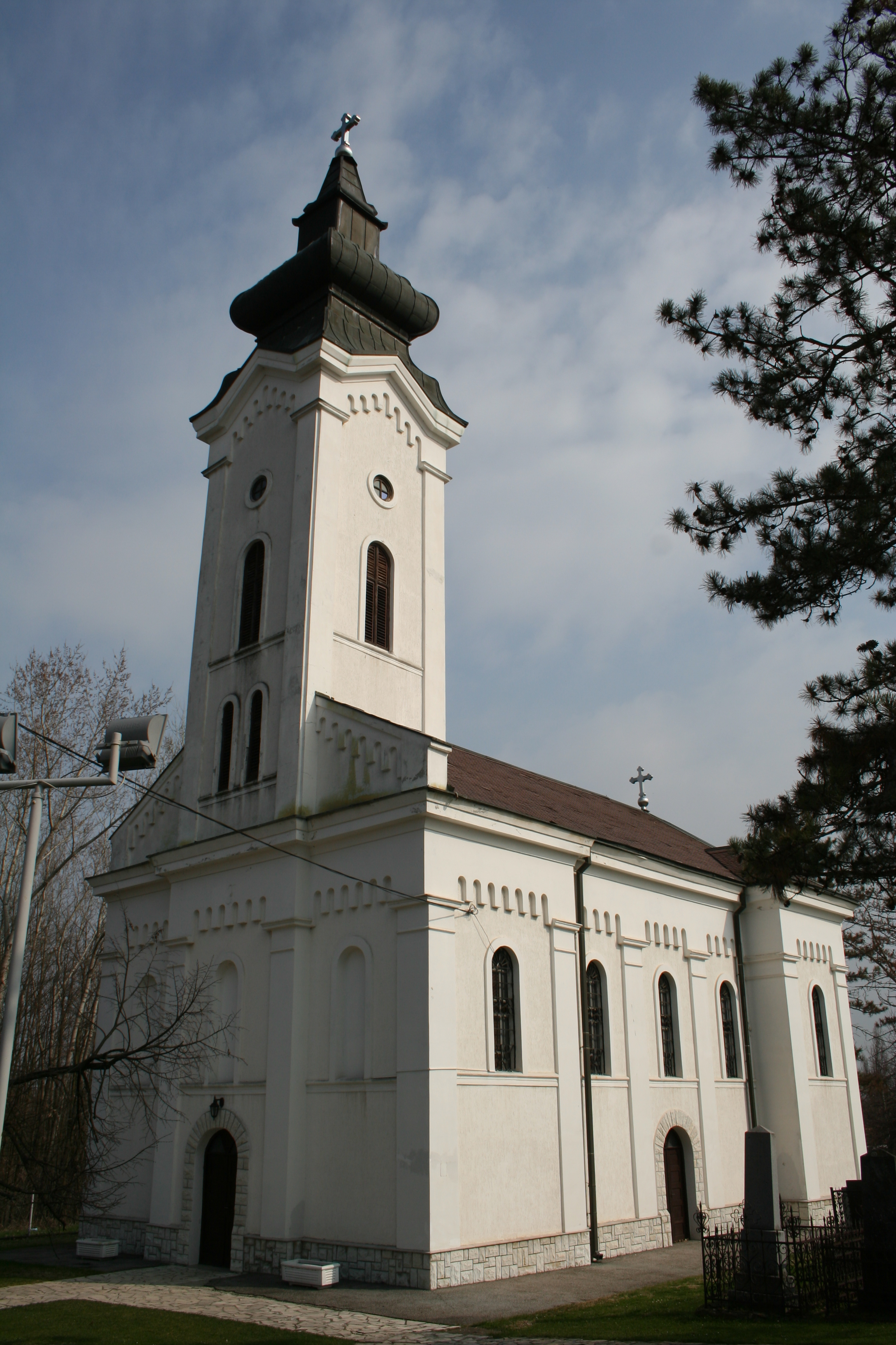 Radljevo, Crkva Pokrova Prsvete Bogorodice